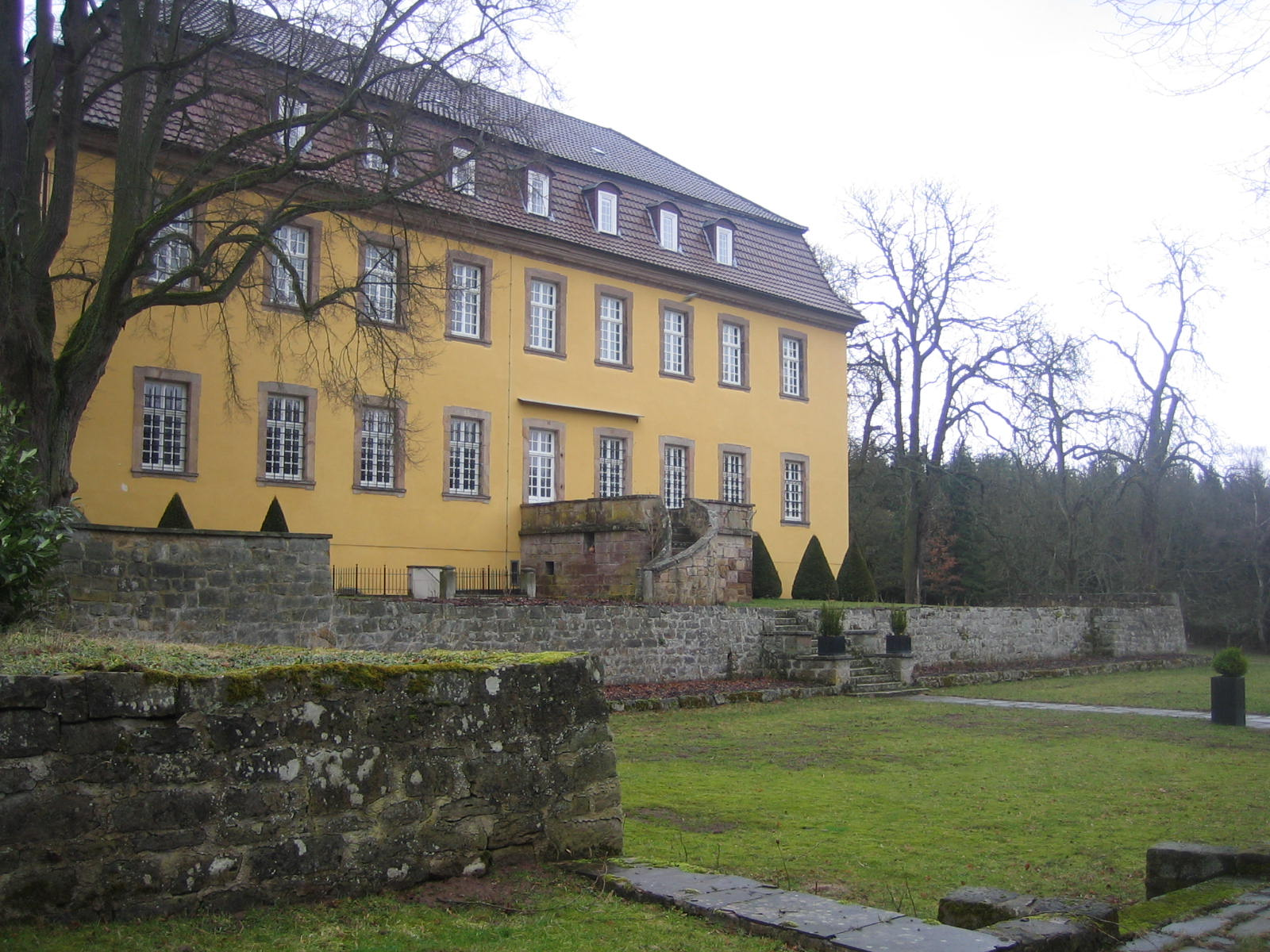 Schloss Hönscheid in Hessen